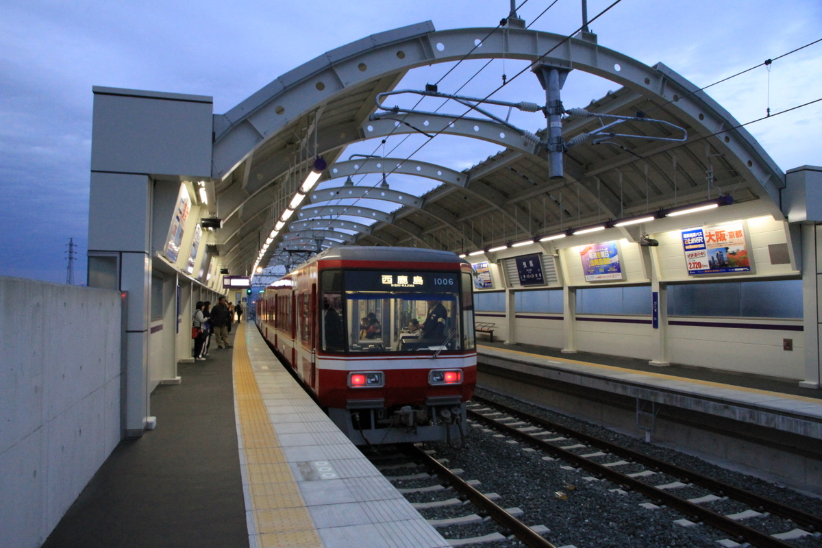 遠州鉄道曳馬駅、高架化後のホーム。